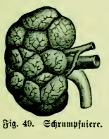 Fig. 49. Schrumpfniere.